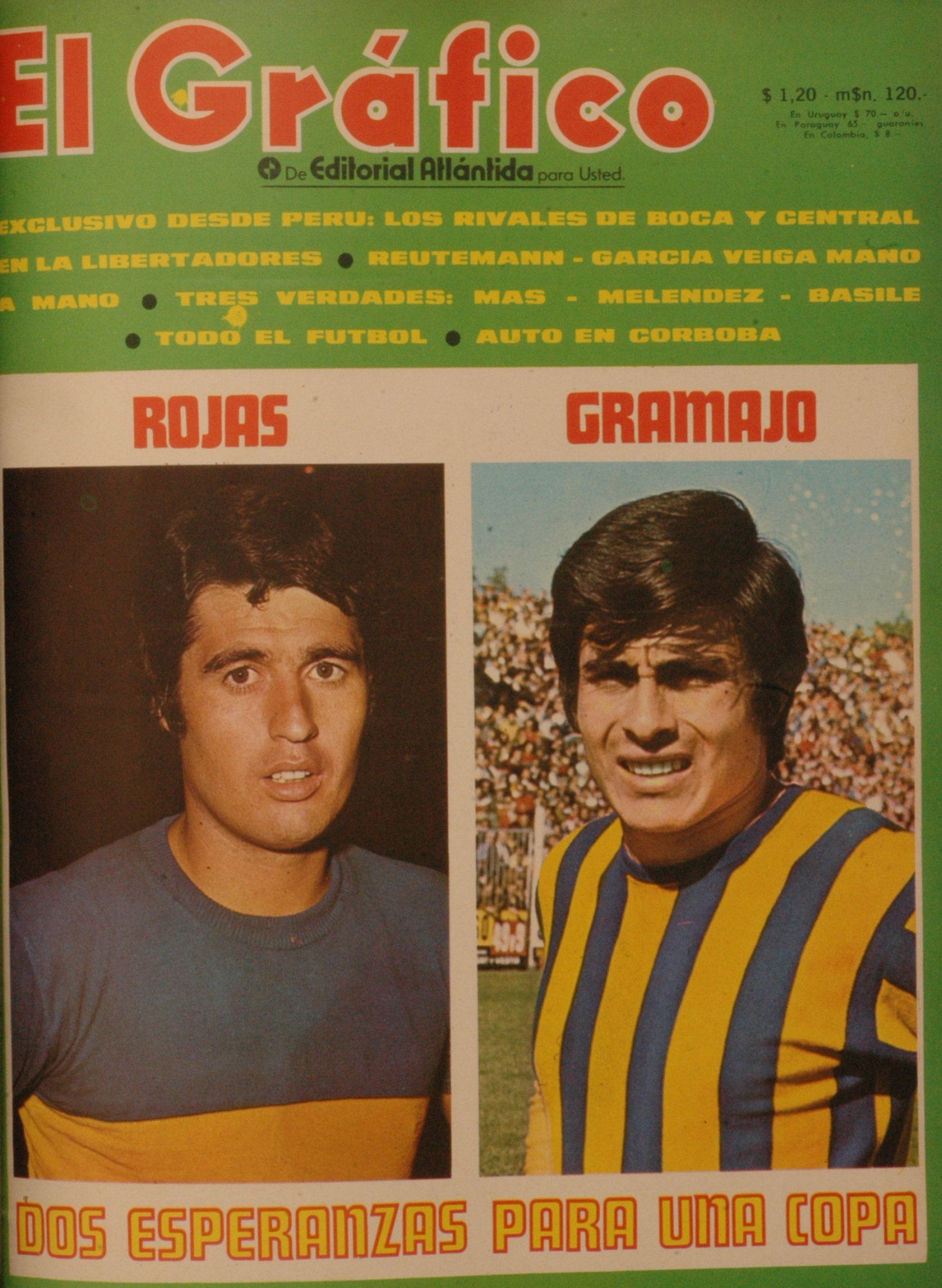 El Grafico del 16 de Febrero de 1971. Edicion 2680